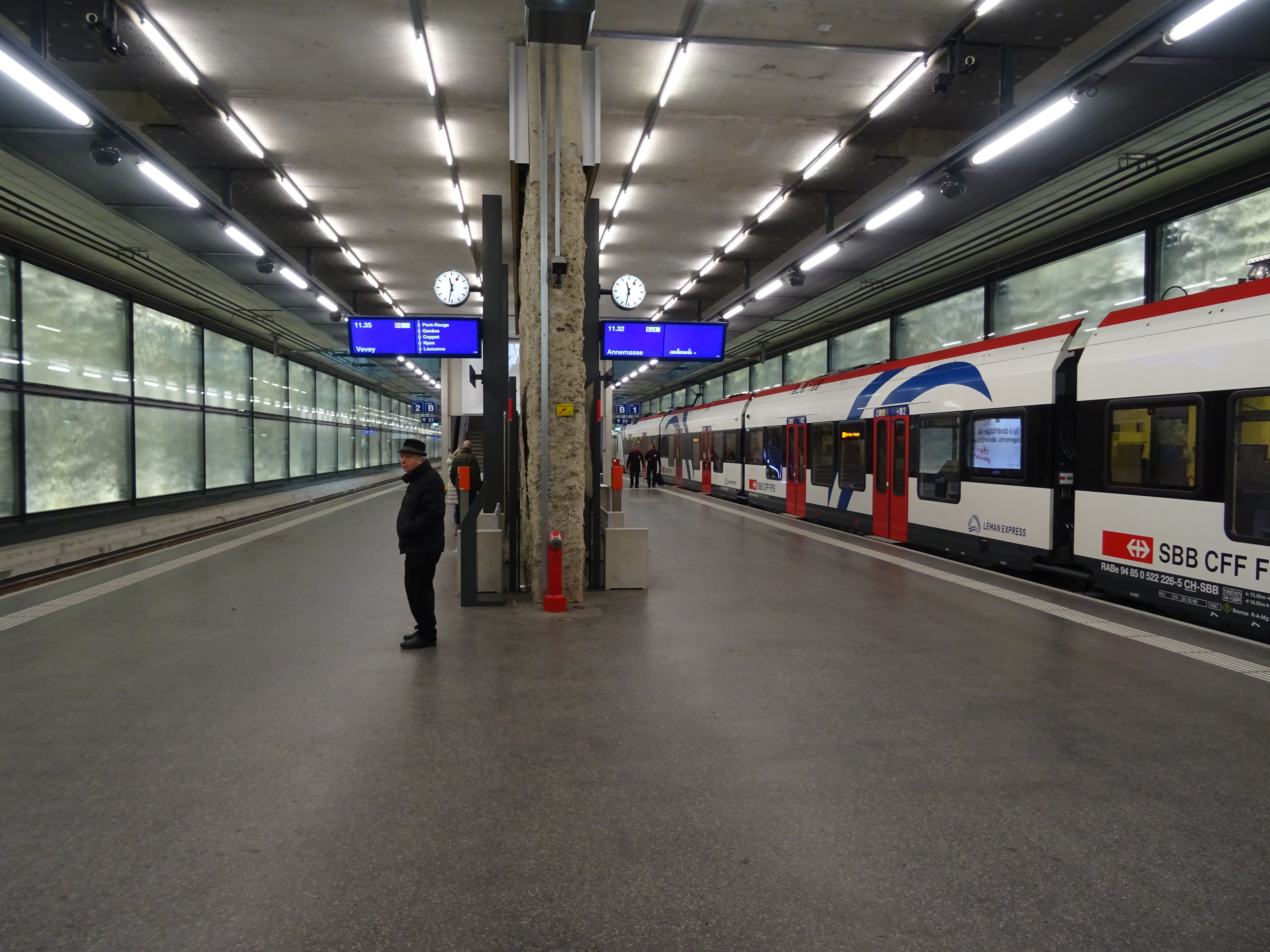 Quai central de la gare de Genève-Eaux-Vives avec un FLIRT Léman Express à destination d'Annemasse à droite.